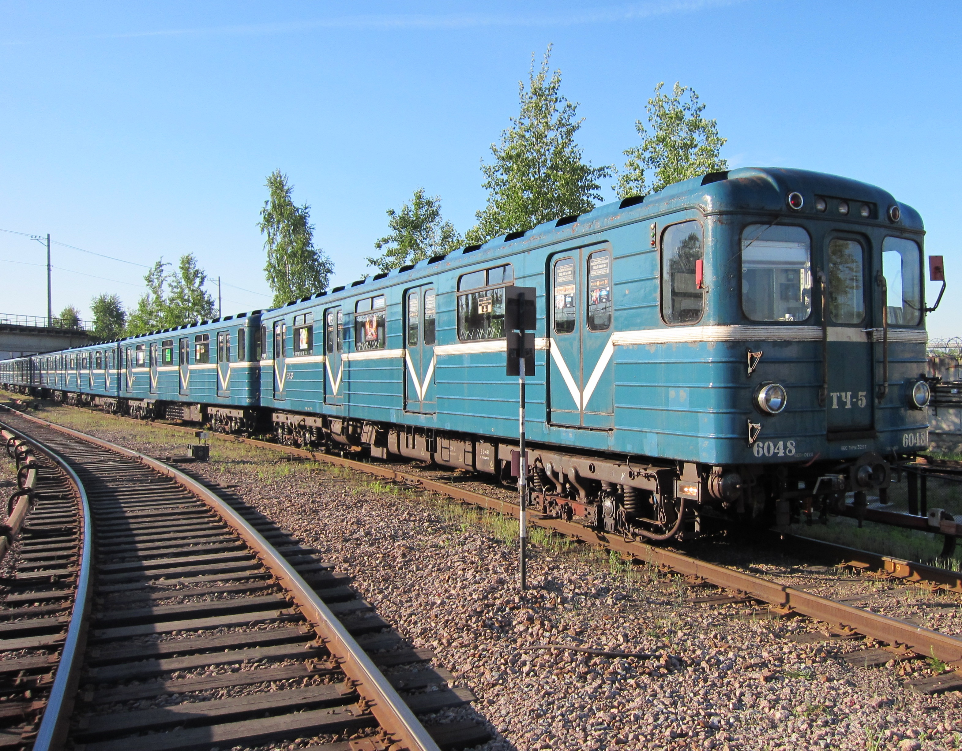 Поезд из вагонов типа Ем в депо Невское